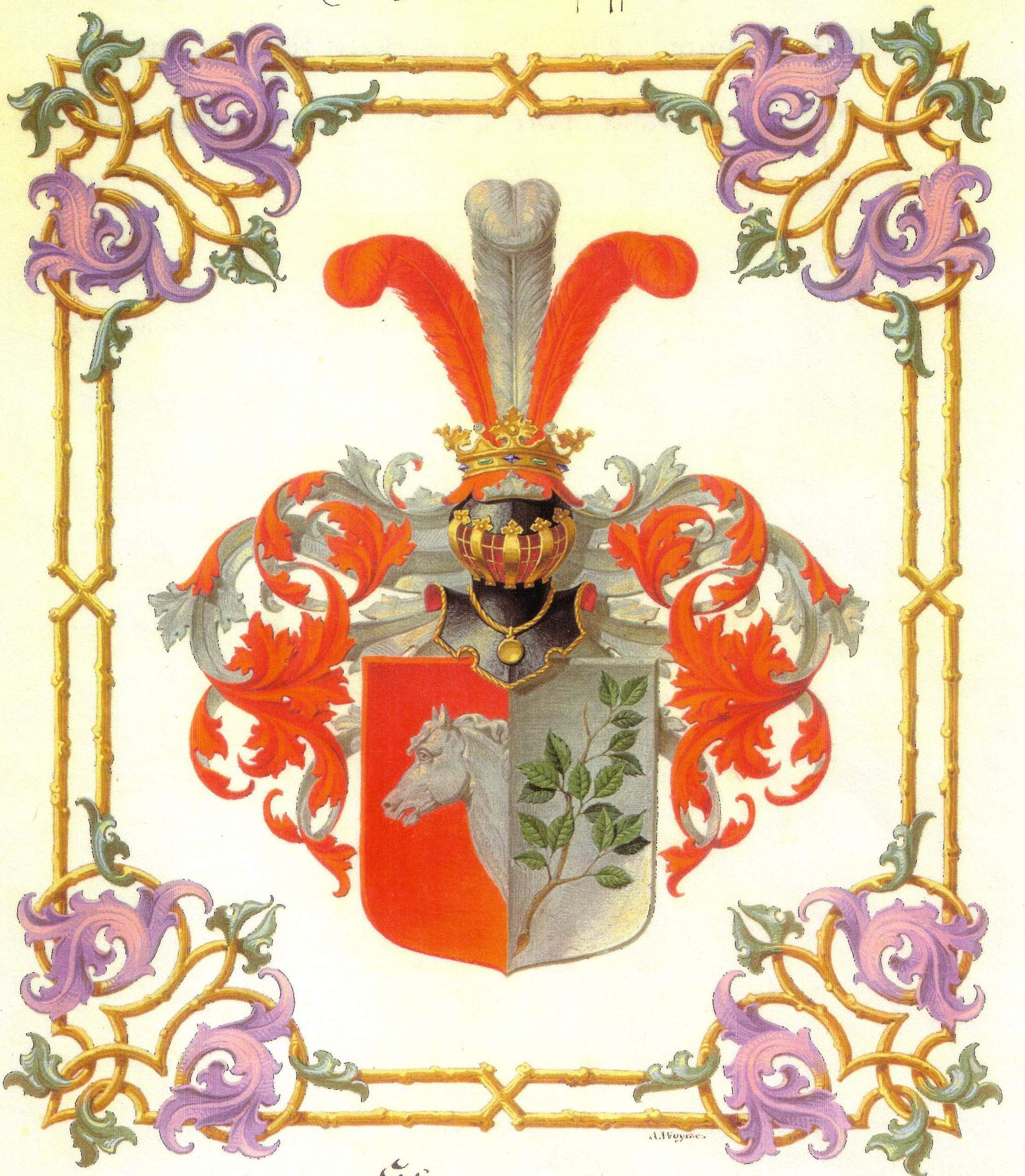 Wappen der Hundisburger Linie, Familie von Nathusius